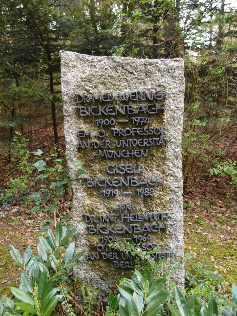 Grab des Gynäkologen Werner Bickenbach auf dem Waldfriedhof in München